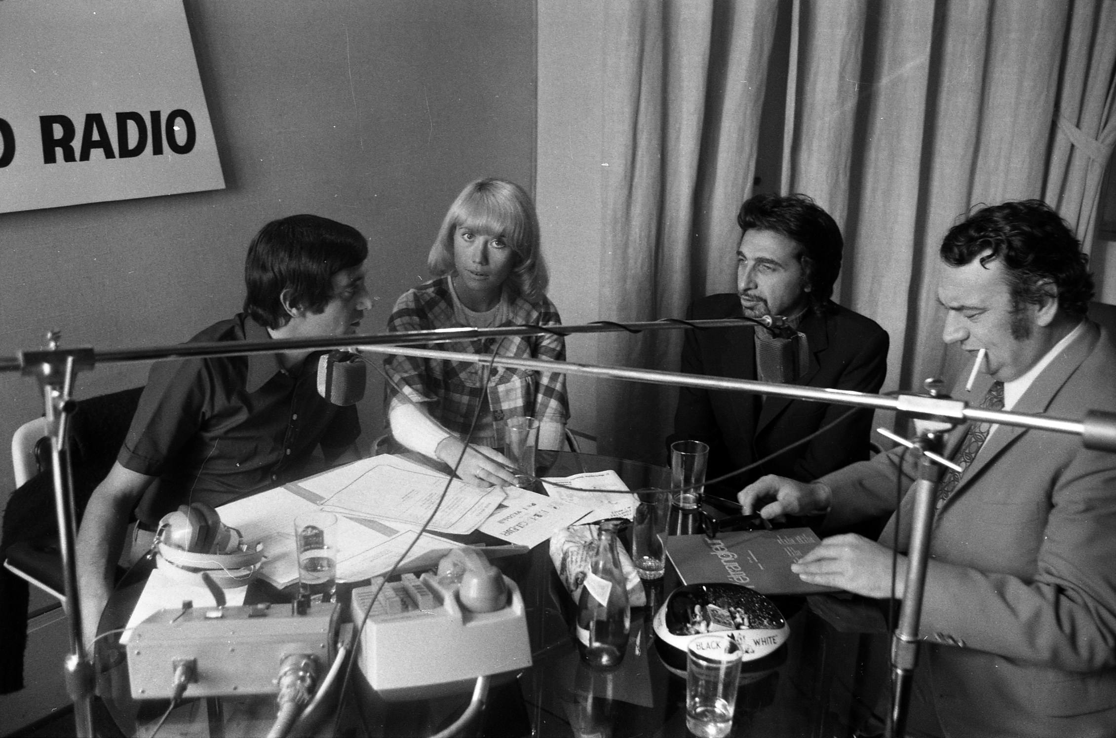 intérieur d'un studio de Sud radio. Le mois de septembre 1972. Vue d'ensemble en plongée de Claude Manlay entourée de l'animateur radio à sa droite et du réalisateur Paul Vecchiali à sa gauche venu présenter son film "L'étrangleur".A droite de l'image l'acteur Julien Guiomar intèrprète principal du film.